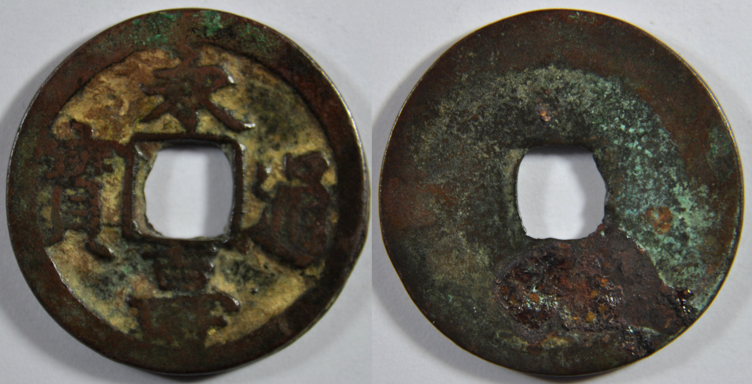 Une monnaie en bronze d'une sapèque de l'empereur Le Than Tong (1649-1662), ère Vinh Tho (1658-1661) de la dynastie des Le postérieurs (Nha Hau Le) qui a dirigé le Vietnam de 1428 à 1788. A l'époque, le pays s'appelait le Dai Viet. La dynastie des Le connaît une période de contestation. Elle est restaurée en 1592 mais le pays est partagée en deux. A/ Vinh Tho thong bao (Monnaie courante de l'ère Vinh Tho) R/ vide Dimension : 24,75 mm Poids : 4,12 g. Remarques : Il s'agit d'une monnaie en écriture régulière (kaishu). Il en existe aussi en cursif et en écriture en herbe et parfois les caractères sont mêlés. Il y a beaucoup de monnaies de cette période. En 1592, Dong Kinh, la capitale, est reprise par les partisans des le. C'est la restauration. Les familles Trinh et Nguyen se disputent le pouvoir. En 1599, les Trinh gagnent et la famille Nguyen est exilé au Thuan Hoa dont Nguyen Hoang devient le gouverneur. Trinh Tung devient généralissime. Les seigneurs Trinh gouvernent l'empire tandis que l'empereur a des fonctions rituelles. Les seigneurs Nguyen gouvernent la partie sud appelée Dang Trong et les Trinh la partie nord appelée Dang Ngoai. Références : 604 BNF (Catalogue des monnaies vietnamiennes, François Thierry, 1988); MNIS 4482 Indice de rareté : TC (Très Commune)